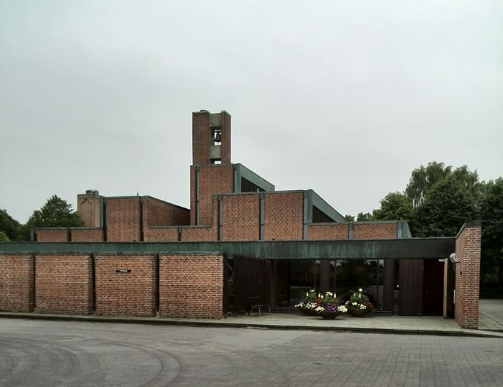 Østre Kirkegård, Vejgaard, Aalborg Denmark